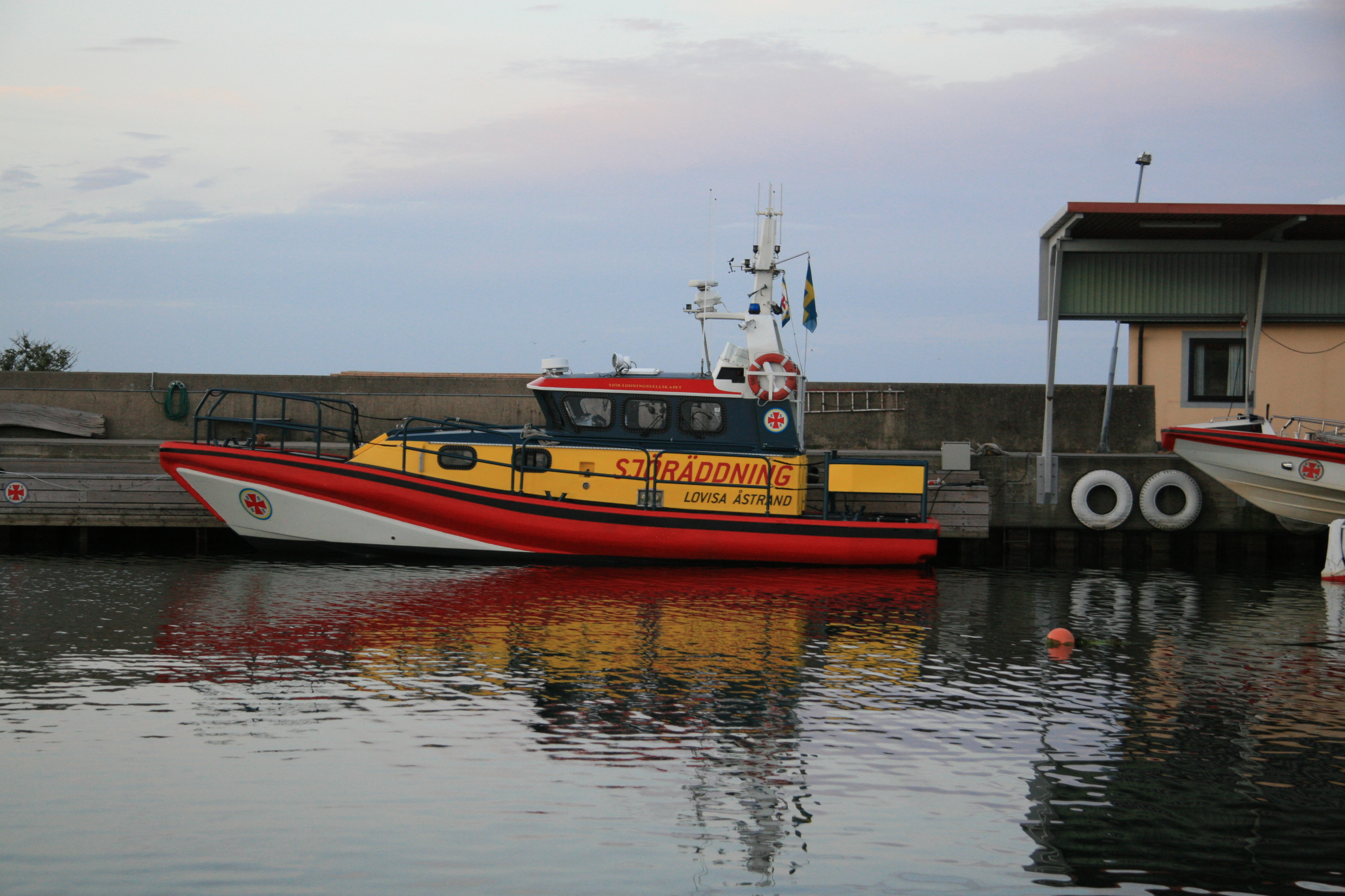 Rescue Lovisa Åstrand 16 juli 2008